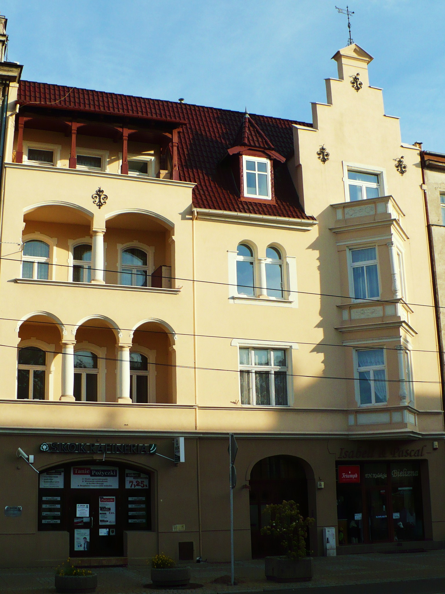 kamienica, 1897-1898 Bydgoszcz, ul. Gdańska 28